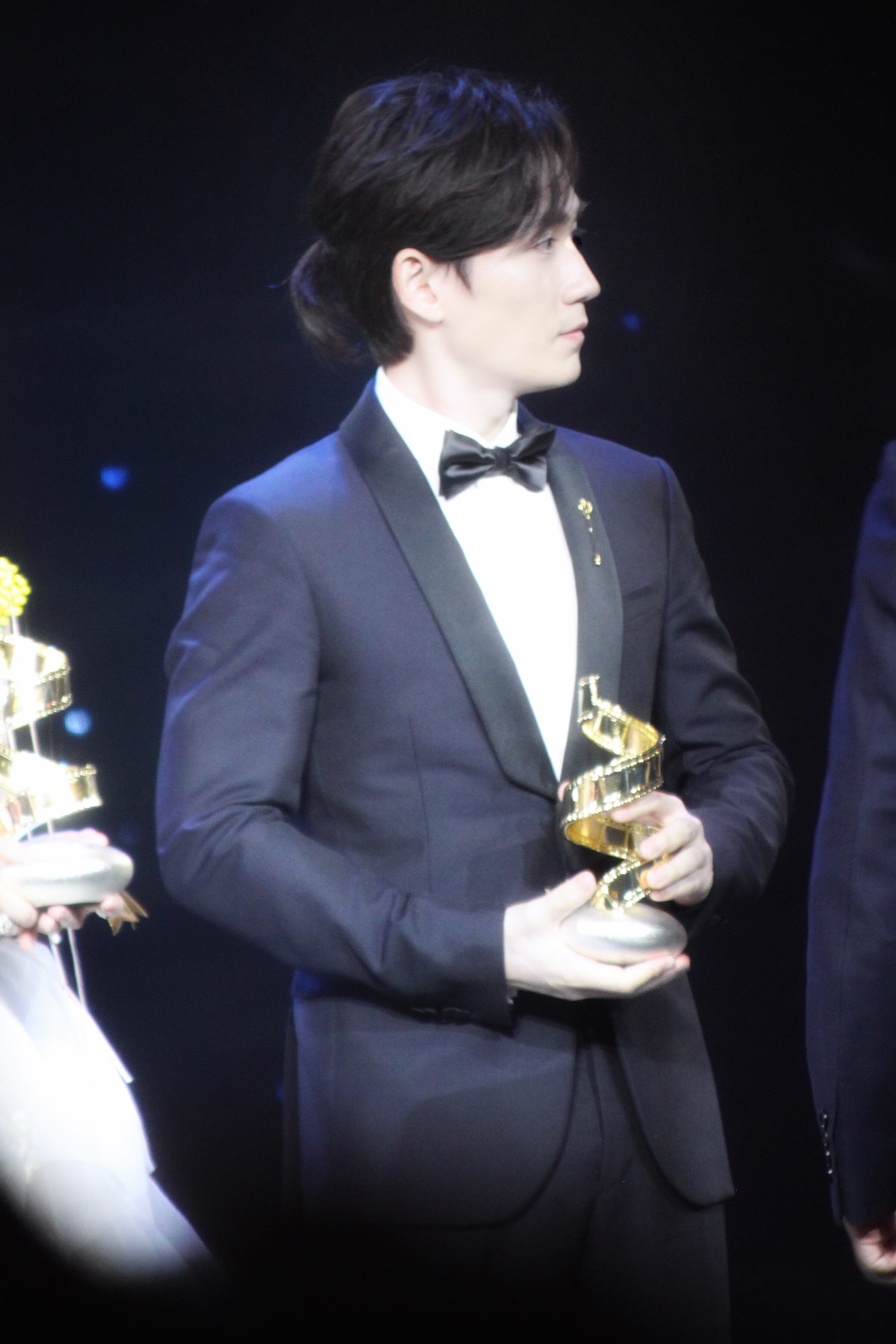 微博电影之夜 (朱一龙)